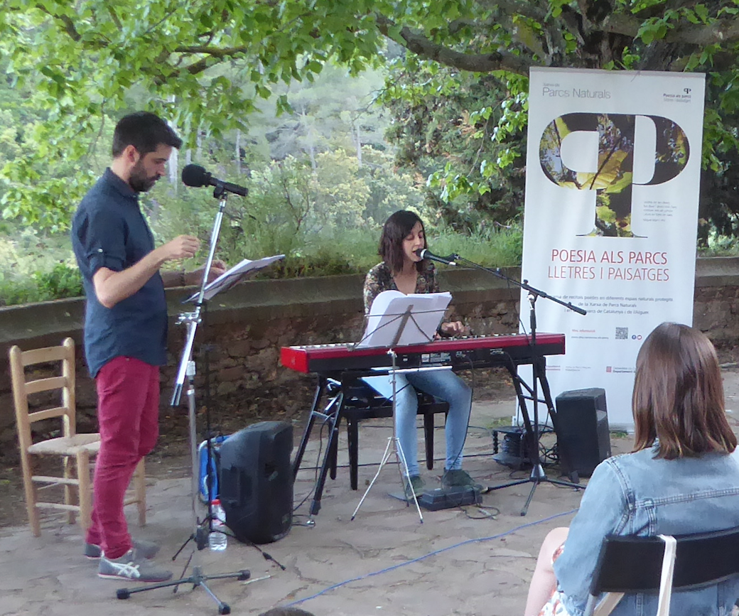 Lu Rois i Roc Casagran al Marquet de les Roques, en el marc de Poesia al Parc, organitzat per la Diputació de Barcelona